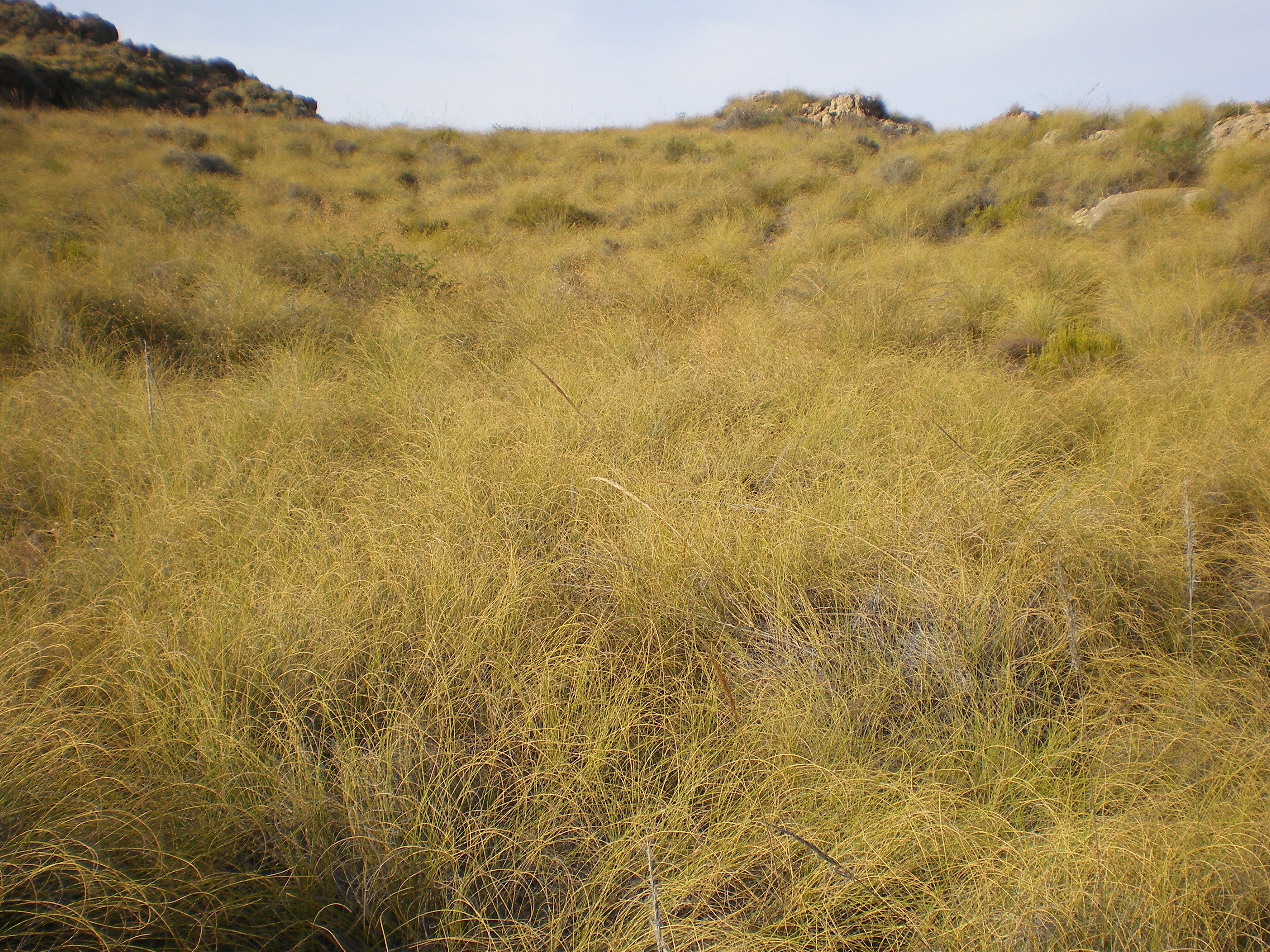 Espartales